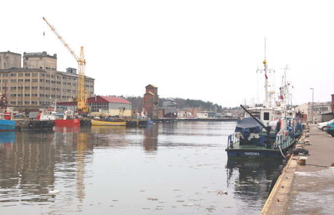 Port w Ustce